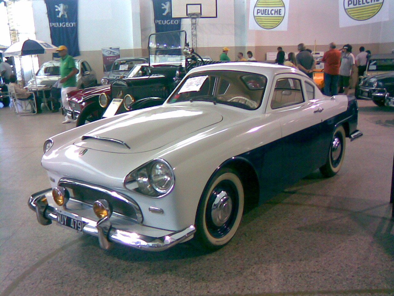 Auto justicialista 01